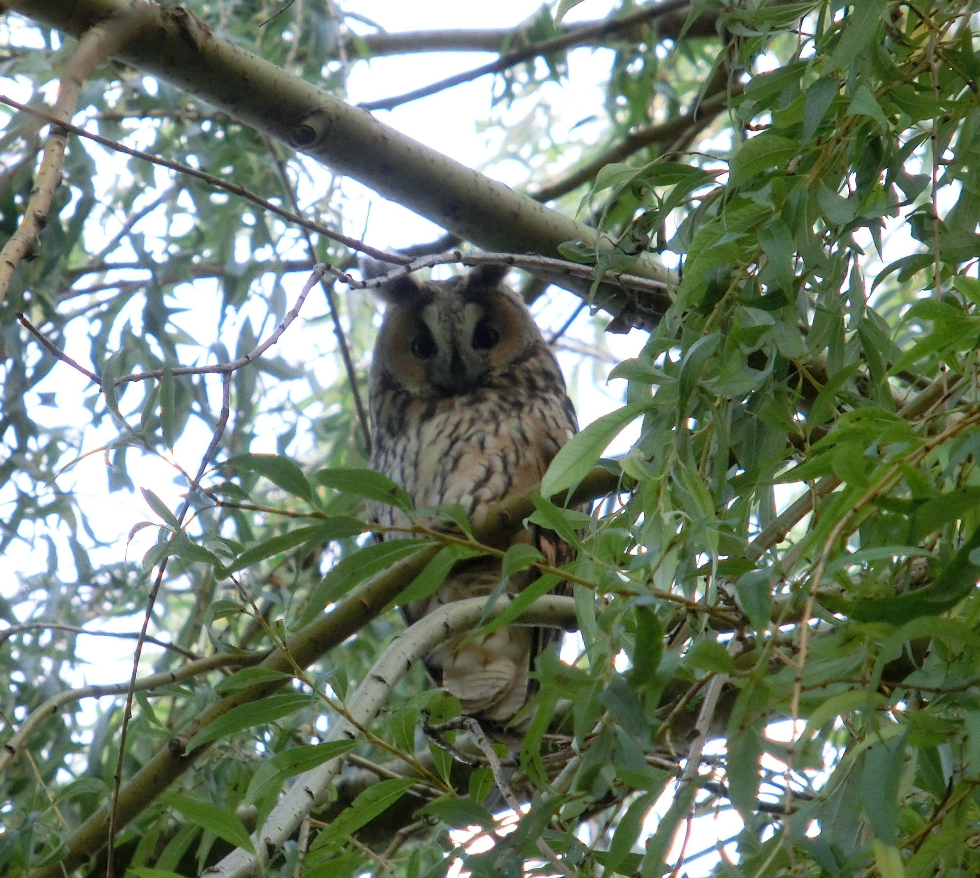 Klaous Ušatý v oklí Milovic